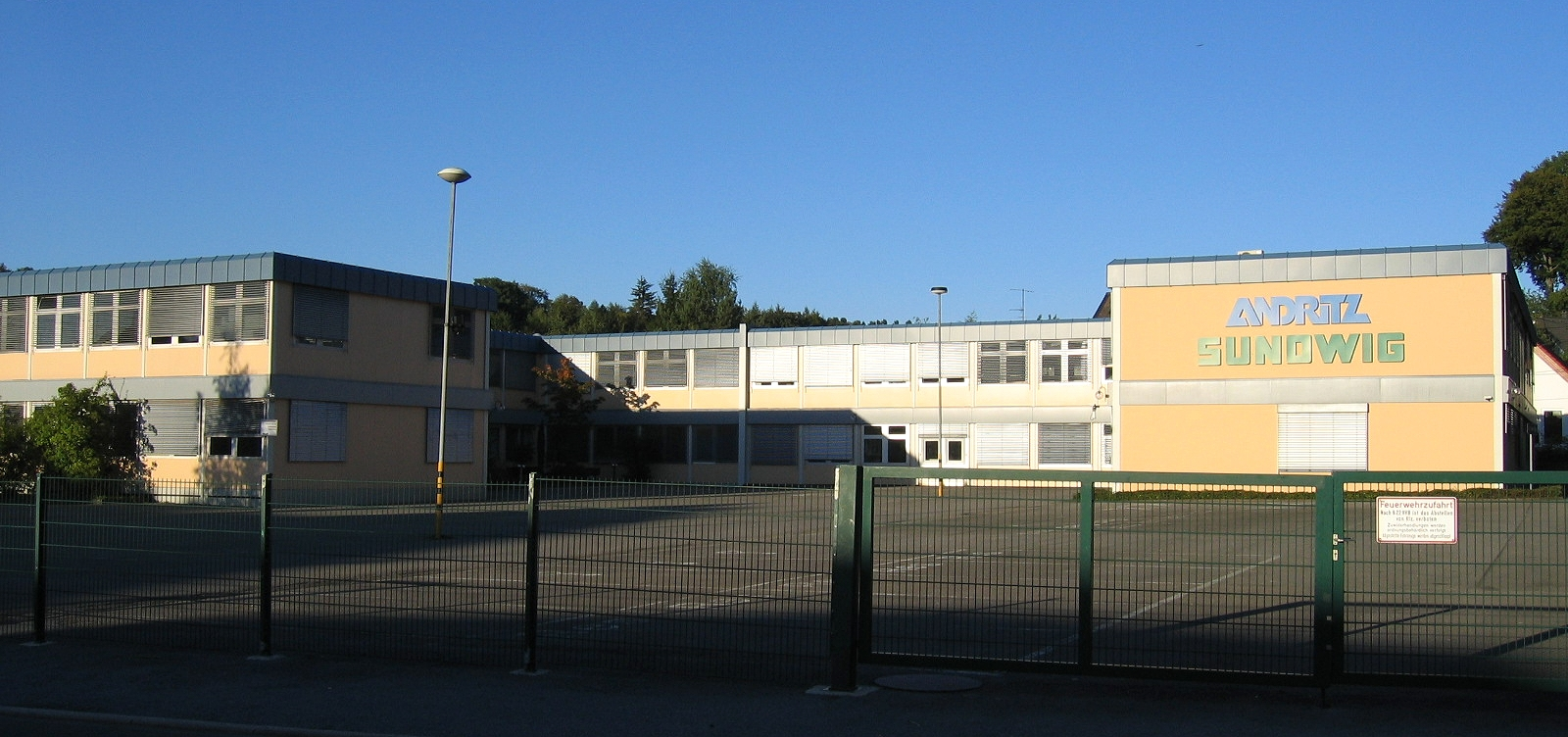 Neue Fabrikgebäude der Sundwig GmbH in Hemer